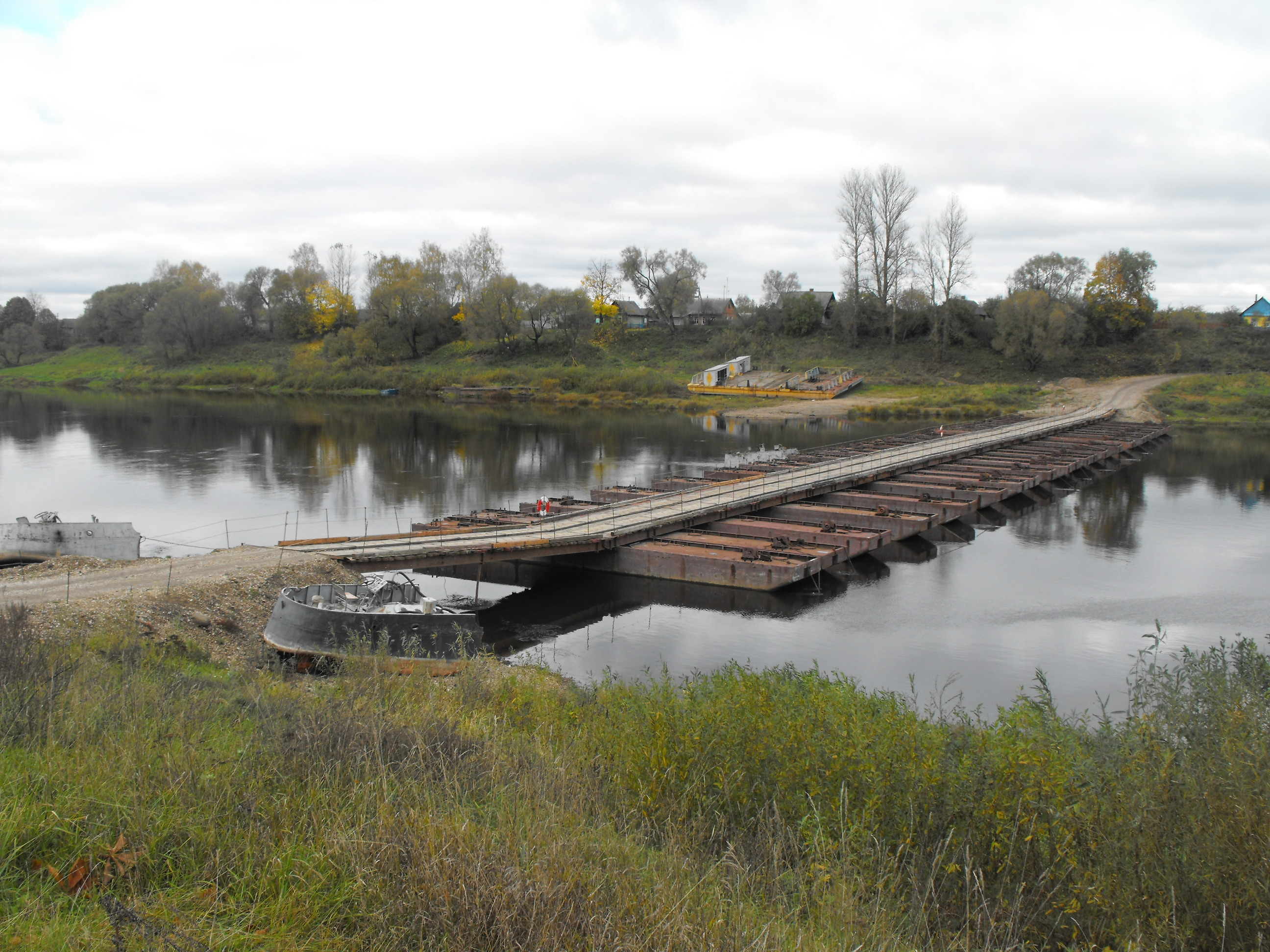 Вид со стороны Бешенковичей с улицы Советской на место массового убийства евреев Бешенковичского гетто на берегу Западной Двины